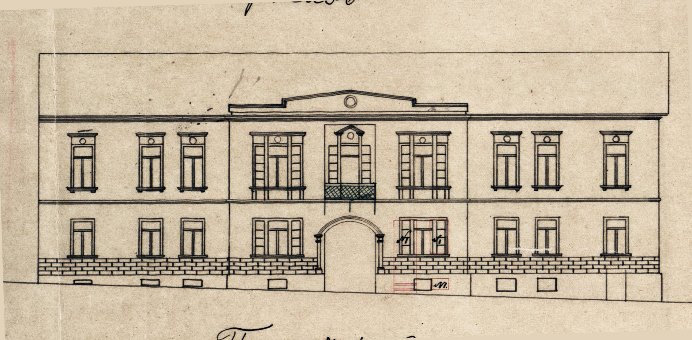 Беларуская (тарашкевіца): Менск (Miensk), вуліца Койданаўская (vulica Kojdanaŭskaja). Дом Фогеля (Fogiel)